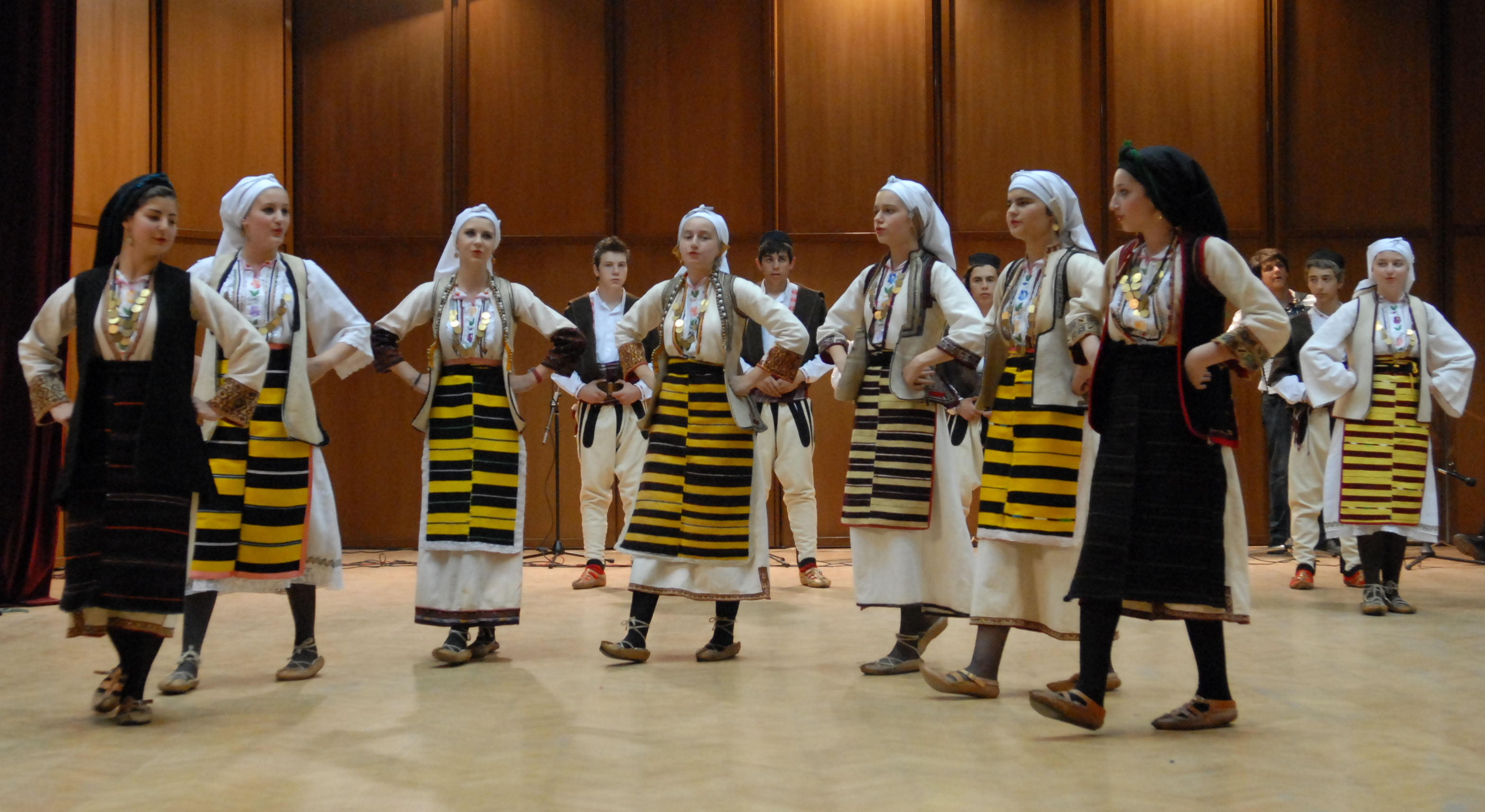 "Копачија" - игри од кичевскиот крај